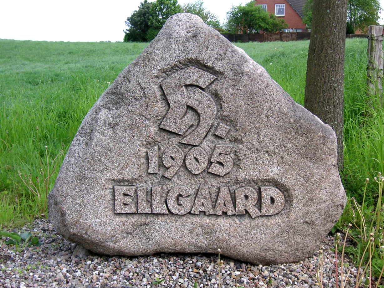 Dollerup, "Ellgaard 1905" Gedenkstein von 2005